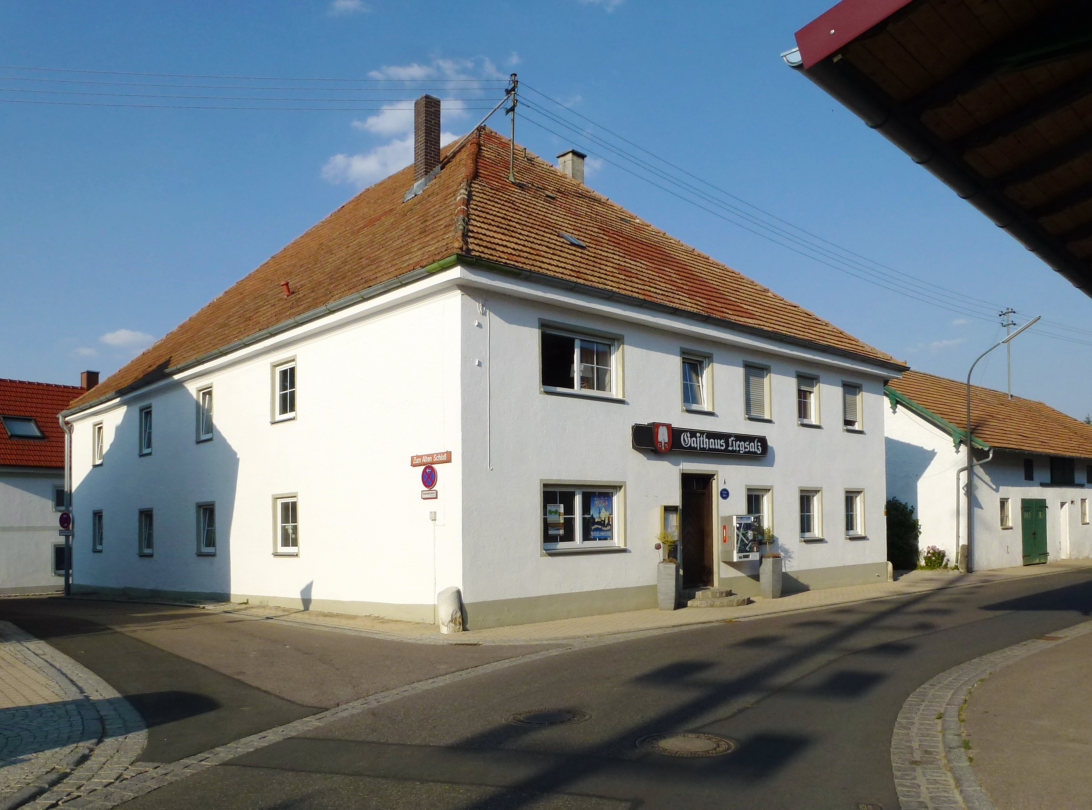 Pellheim, Dorfstr.4 und 6: Gasthof. Ansicht von WSW